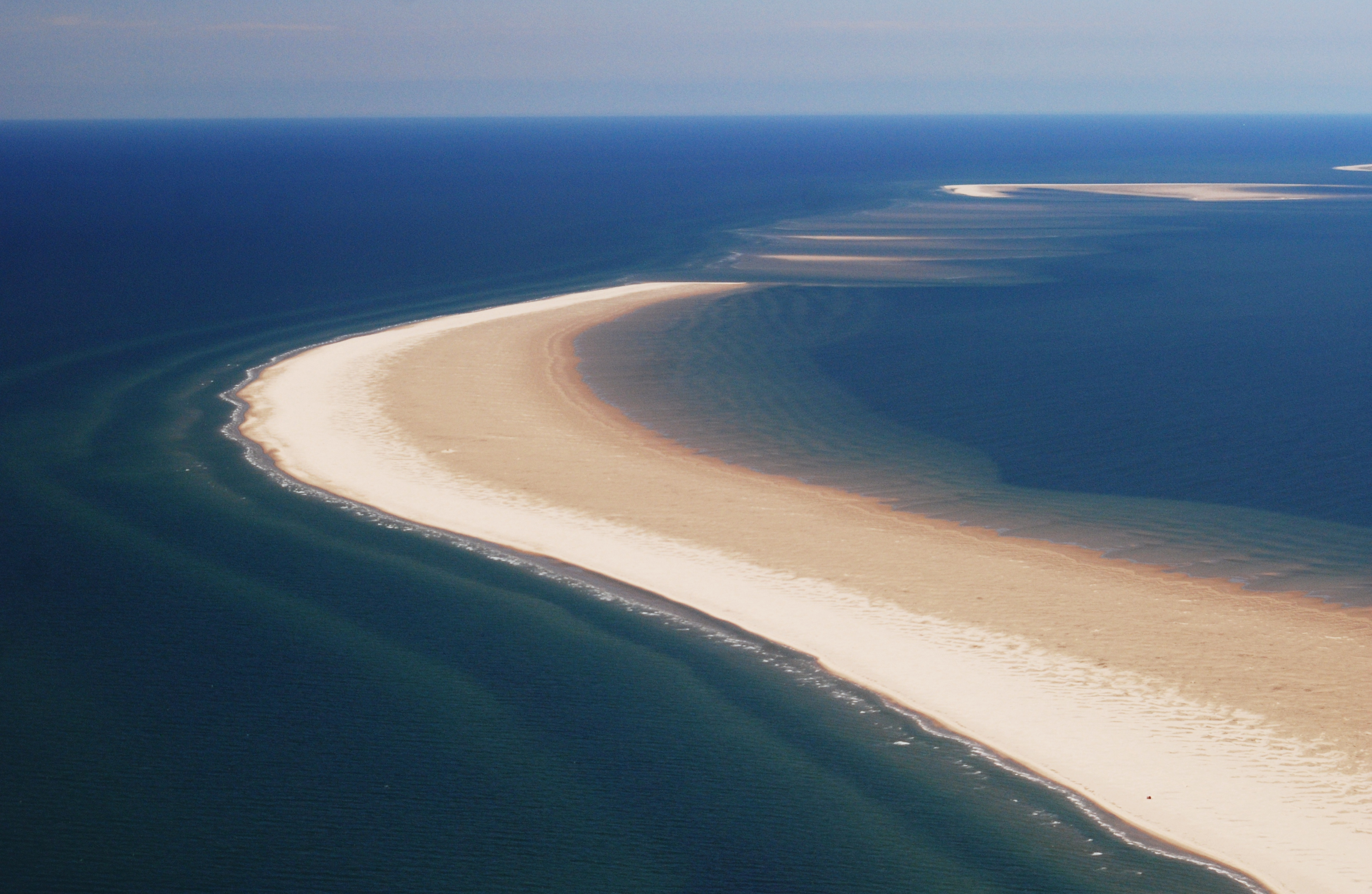 Kolguev